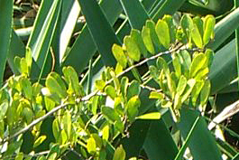 Capparis flexuosa